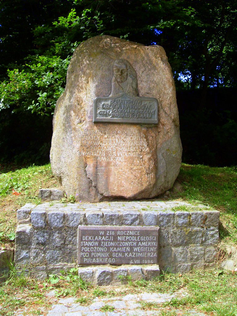 Pomnik w Park przy Amfiteatrze w Koszalinie poświęcony Kazimierzowi Pułaskiemu. Treść na tablicy: Bohaterowi obojga narodów gen. Kazimierzowi Pułaskiemu Bałtyckie Towarzystwo Polska-Stany Zjednoczone